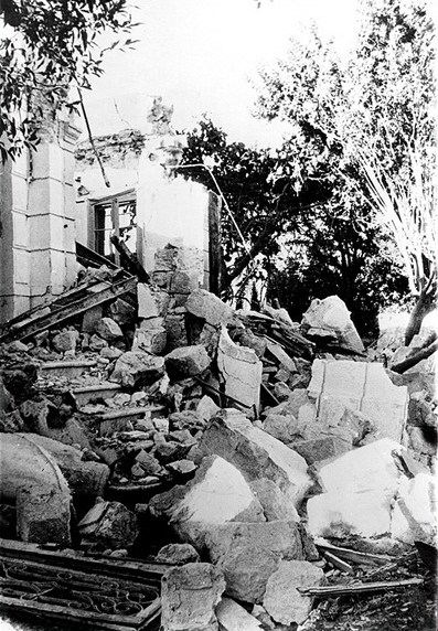 Ruines résultant d'une attaque sur le village de Tazerka en Tunisie